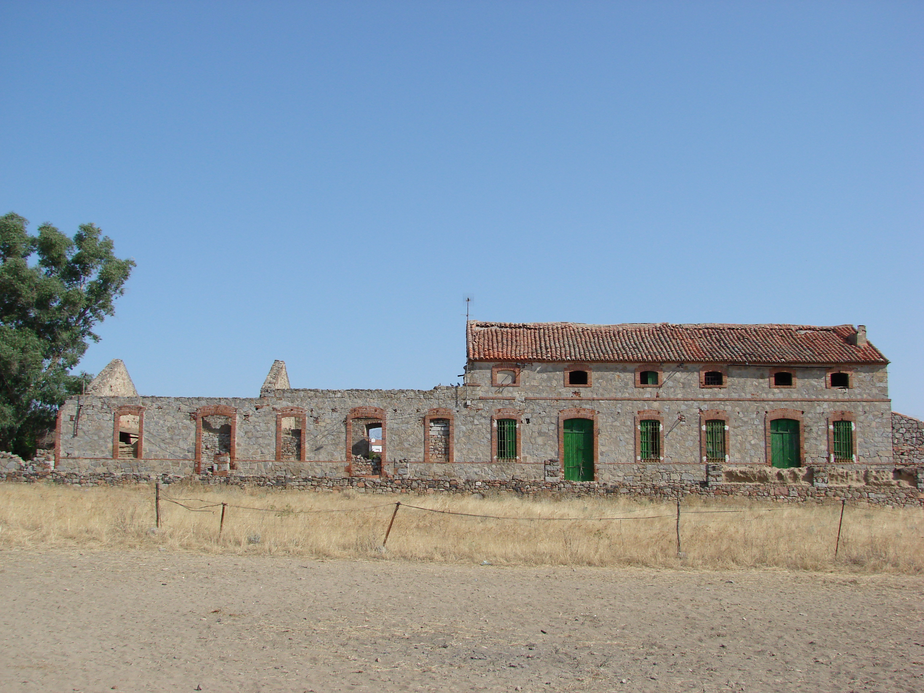 Construída a principios del siglo XX, dotó de electricidad por primera vez al pueblo.